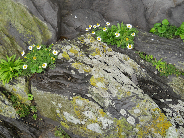 lichen